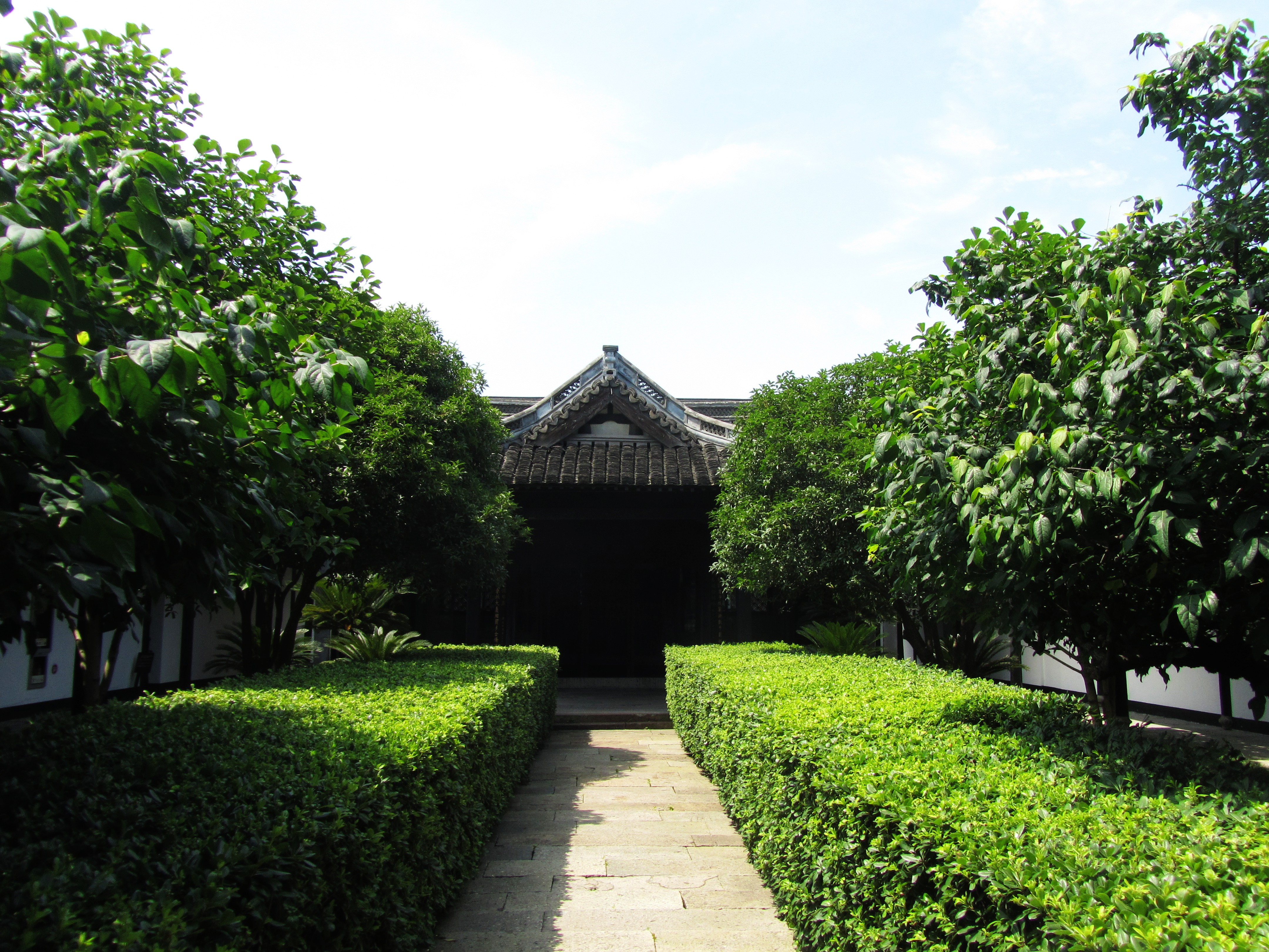 绍兴大通学堂，礼堂。